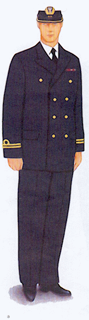 Rysunek ten pochodzi z załącznika do rozporządzenia ministra obrony narodowej z dnia 2 grudnia 2004 r. w sprawie wzorów oraz noszenia umundurowania i oznak wojskowych przez żołnierzy zawodowych i kandydatów na żołnierzy zawodowych.